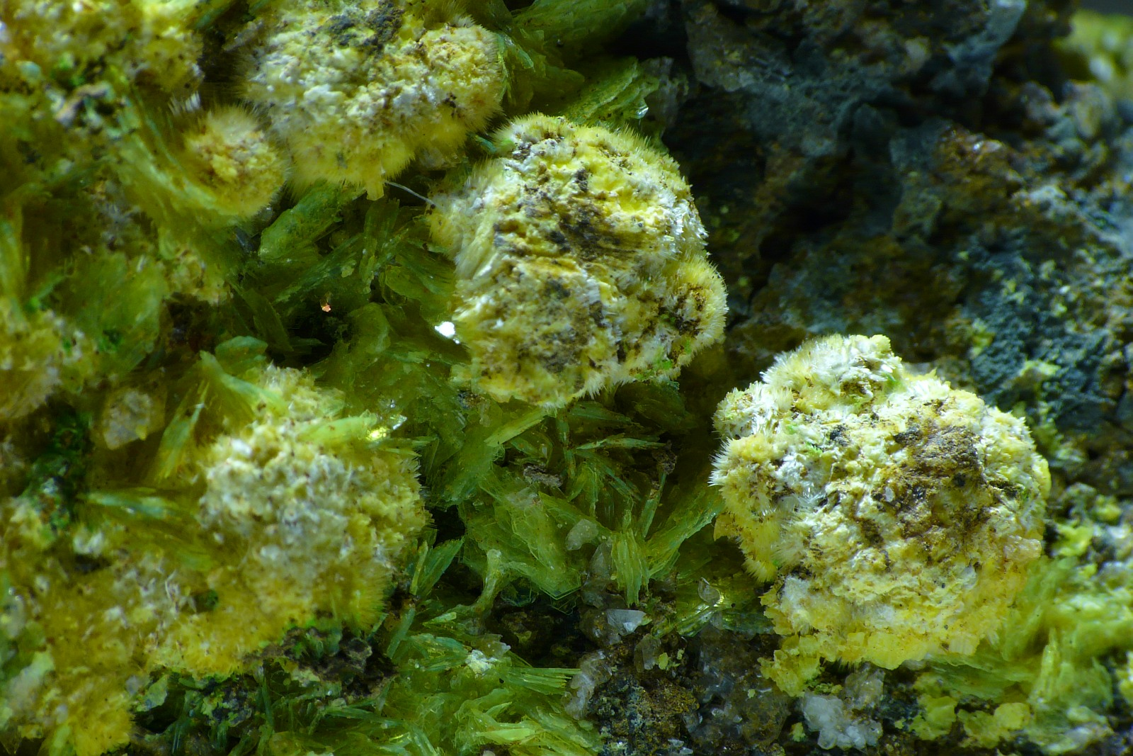 Zellerit, Schröckingerit Fundort: White Canyon No. 1 Mine (Cameo Mine), White Canyon, White Canyon District, San Juan County (Utah), USA (Fundort bei ) Beschreibung: Hellgelber, nadeliger Zellerit in kugelförmigen Aggregaten mit grünen Täfelchen aus Schröckingerit (Sichtfeld: 16 mm)